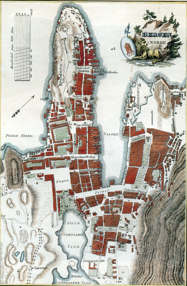 Bergen, 1823.